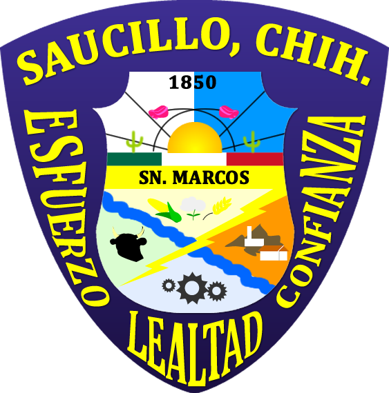 Escudo del municipio de Saucillo: En su interior se dibujan dos cuarteles divididos por los colores de la bandera mexicana y por una franja amarilla, con el nombre de la hacienda que le dio origen: San Marcos. En el cuartel superior un sol que simboliza vida y del cual brotan rosales, en alusión al municipio de Rosales, del cual proceden los actuales habitantes desde 1850. En el interior se observan cuatro secciones divididas por el río Conchos y el rayo de energía eléctrica de Rosetilla, cada uno tiene un color distinto, los cuales representan las cuatro estaciones del año. En ellos se hizo alusión a los productos del municipio: para representar a la agricultura se dibuja una mazorca, un capullo de algodón y una espiga de trigo. Para la industria, unos engranes; la ganadería se representa con una cabeza de bovino y la minería con cerros, torres y una casa.